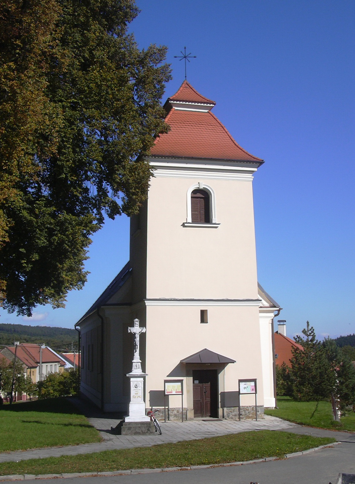 Farní kostel Nanebevzetí Panny Marie Rychtářov (Vyškov) - Czech Republic